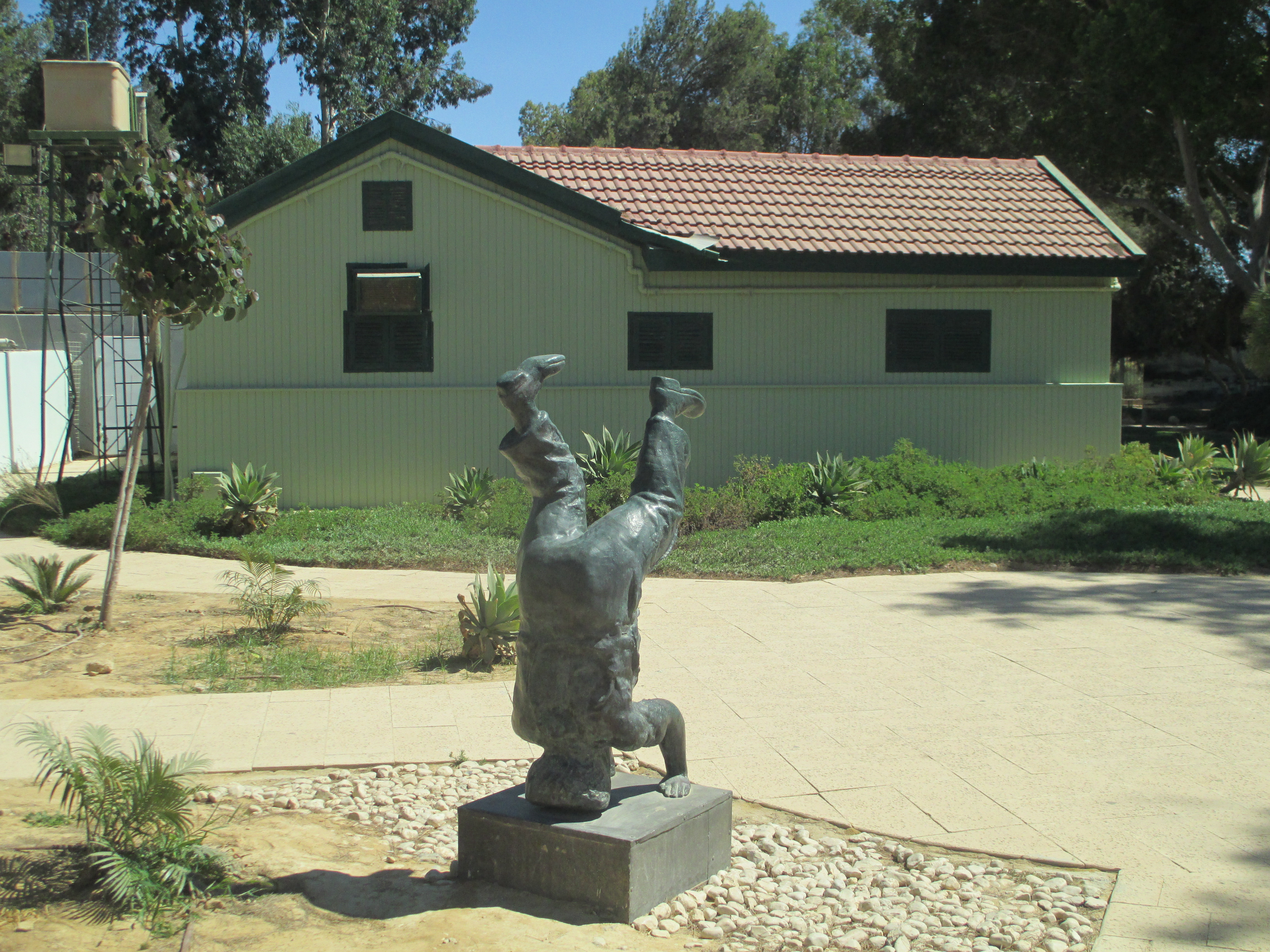 פסל של בן גוריון באתר צריף בן גוריון בשדה בוקר - הפסל הוא רפאל מיימון